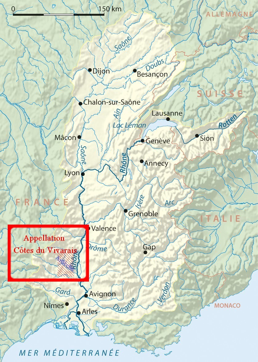 situation géographique de l'appellation "Côtes du Vivarais" dans la Massif central près de la vallée du Rhône; Aménagé à partir de Image:Rhone bassin versant.png de Titus Groan